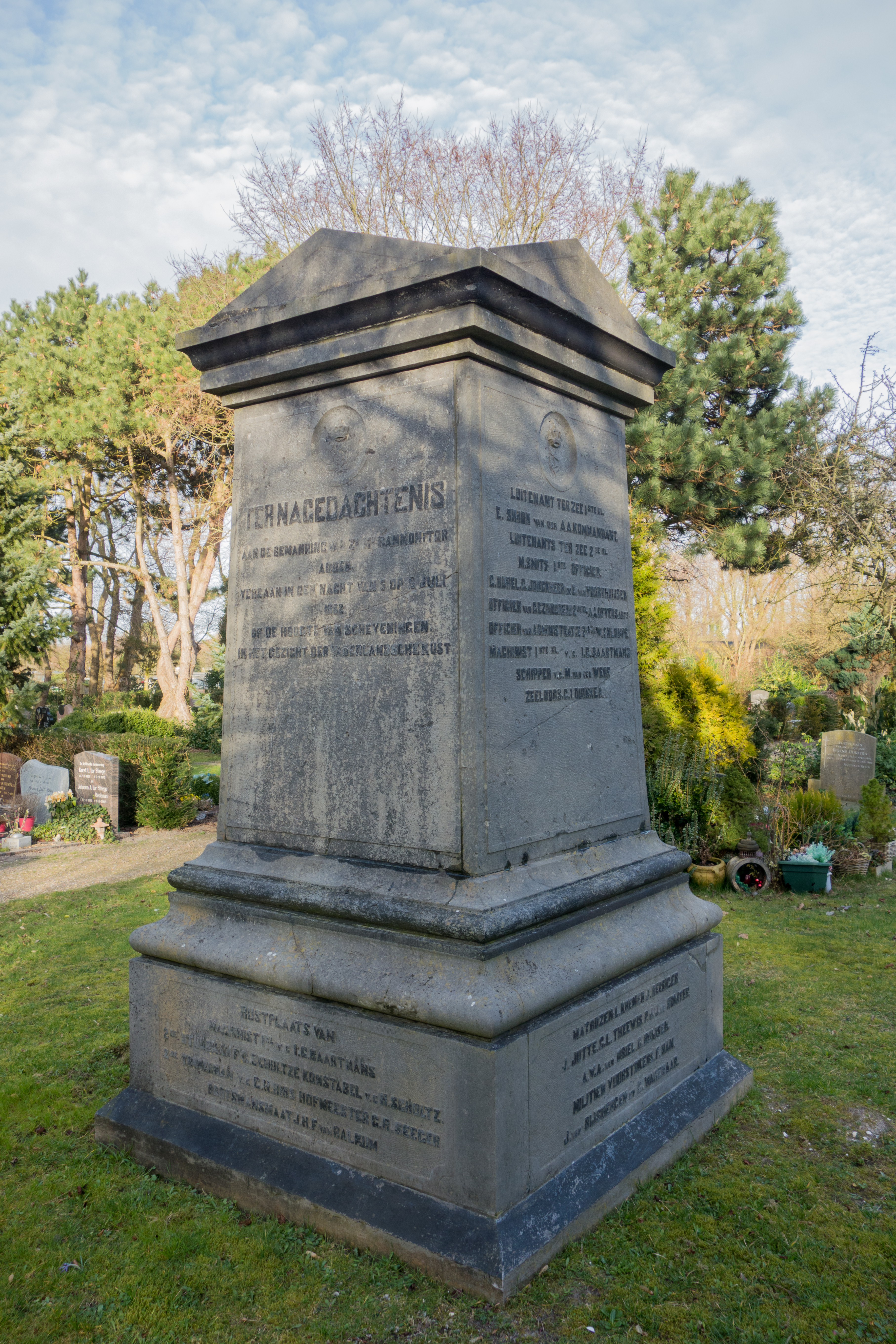 Gedenksteen voor de in 1882 gezonken rammonitor Zr.Ms. Adder.